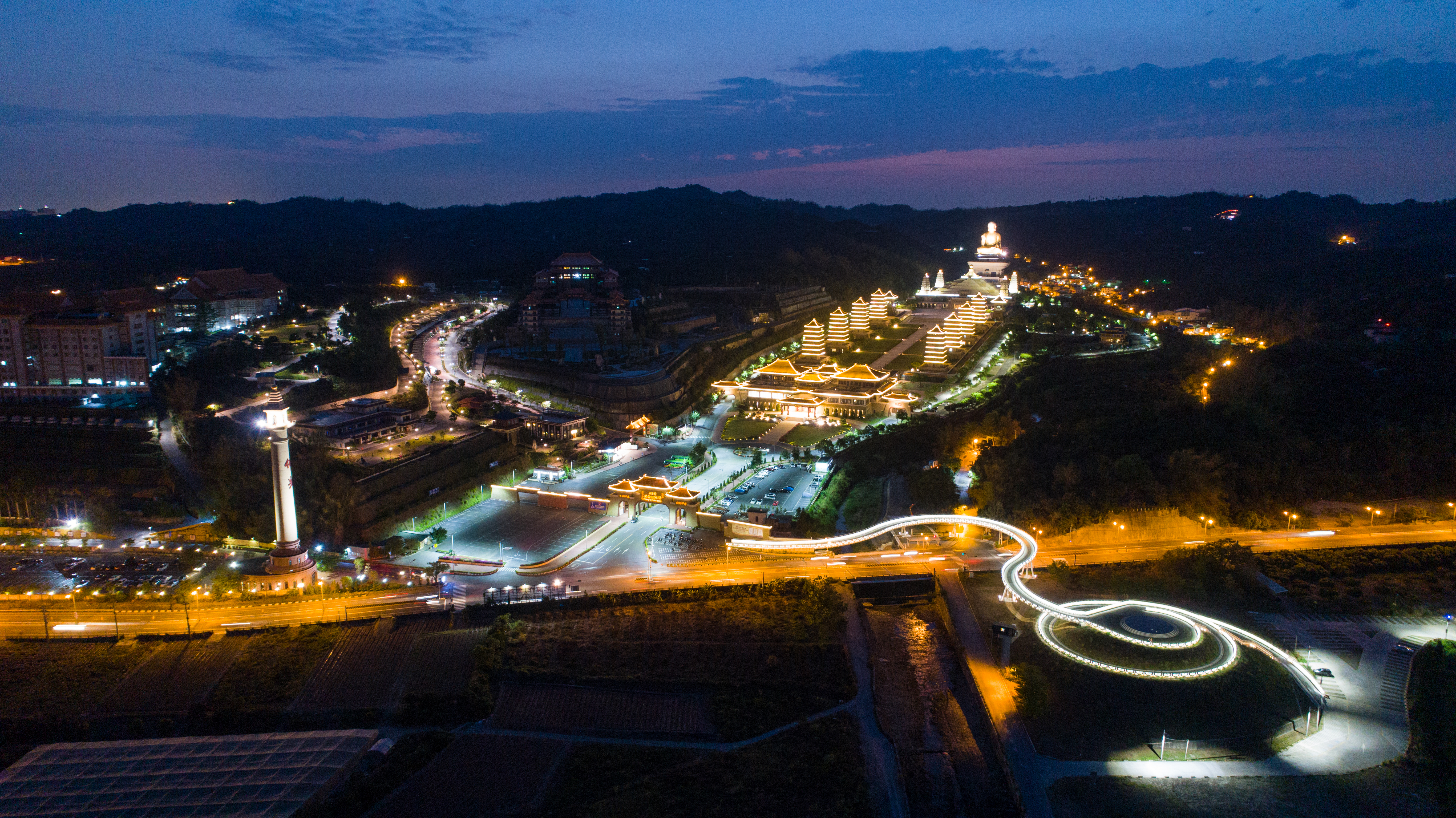 傍晚的佛陀紀念館。拍攝備註：管理人員有特別強調，請勿飛到館內。